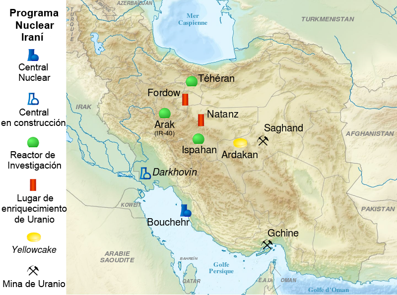 Mapa del programa nuclear iraní